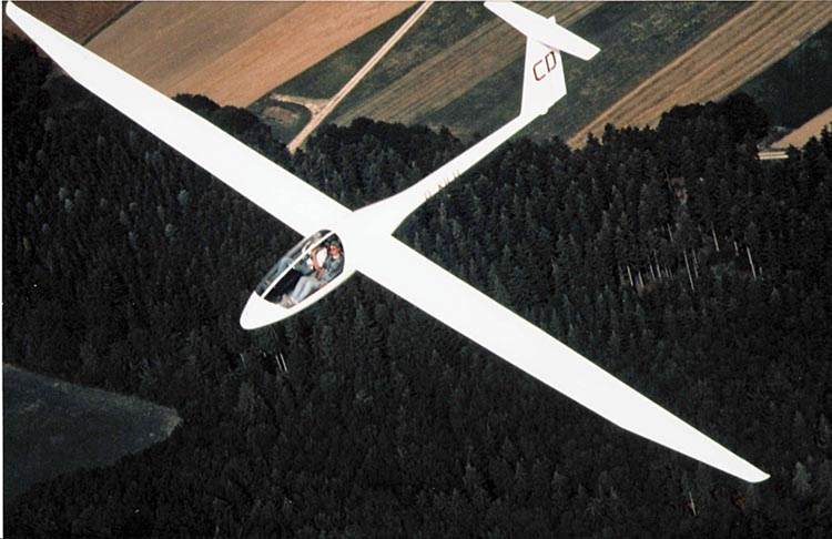 B-13 der Akaflieg Berlin